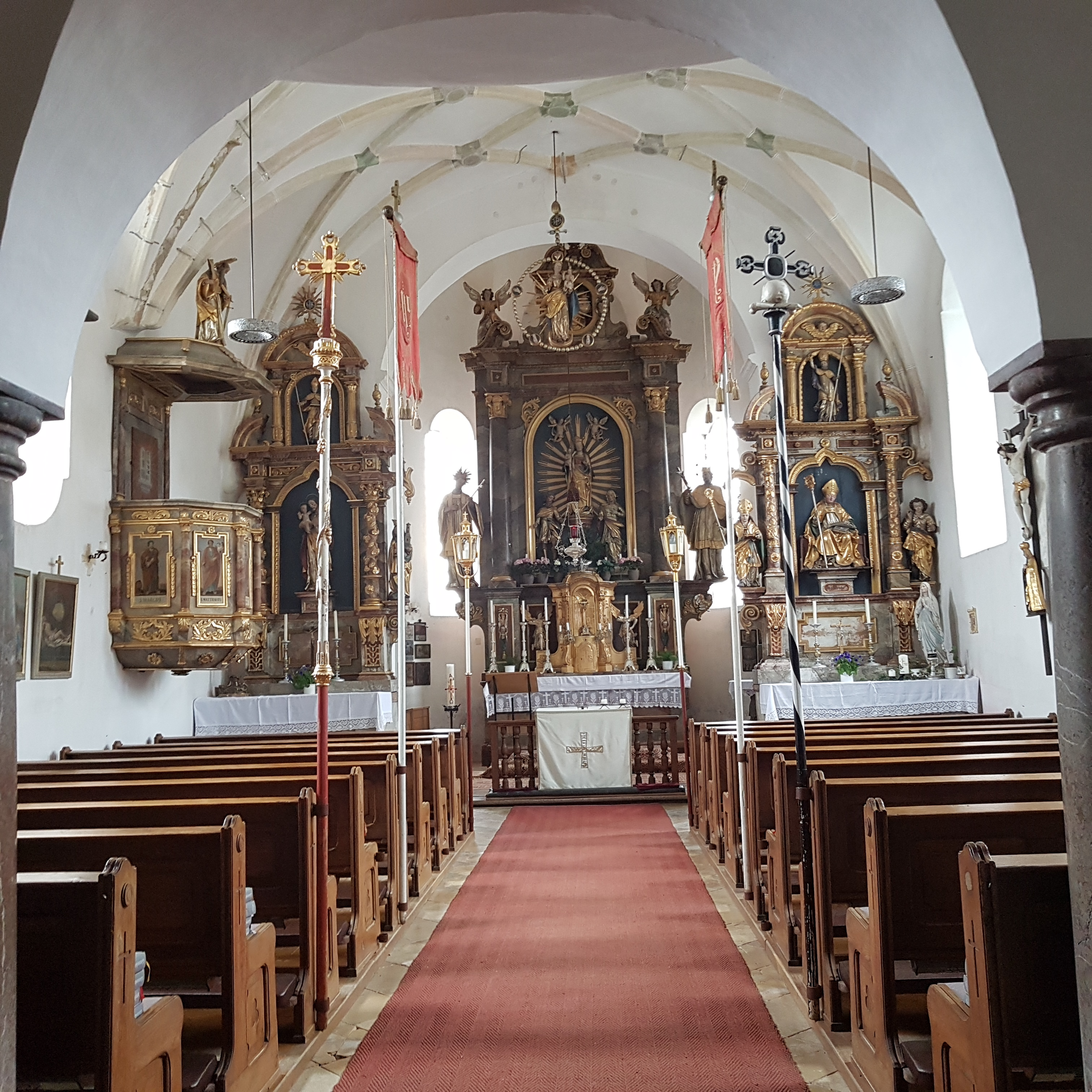 Ergertshausen (Egling), Kuratiekirche Mariä Himmelfahrt, 2. Hälfte 15. Jahrhundert – Chor barock erhöht, Stichkappengewölbe im Langhaus, spätbarocke Altarausstattung um 1700.